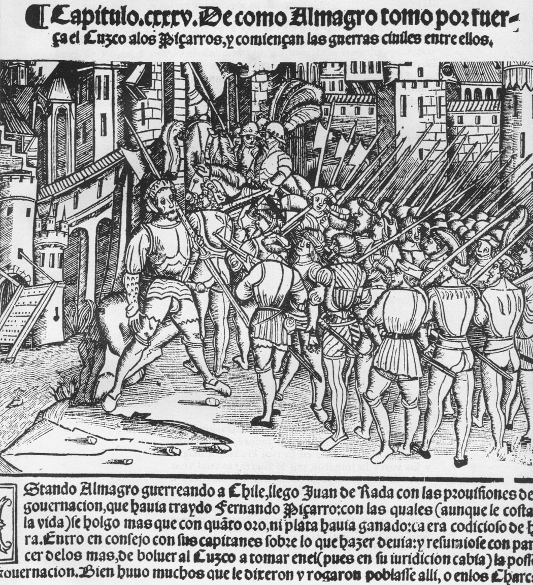 Almagro se apodera del Cuzco